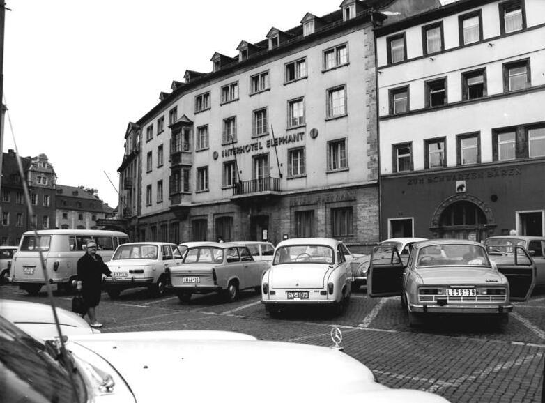 Weimar, Hotel ADN-ZB Demme 16.4.1975 Weimar: Blick auf das Interhotel "Elephant".